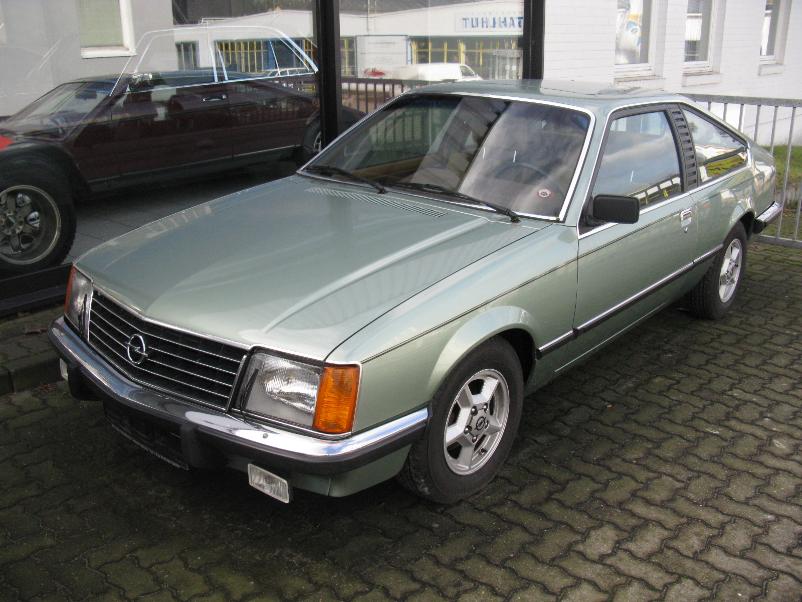 Opel Monza 3.0 S